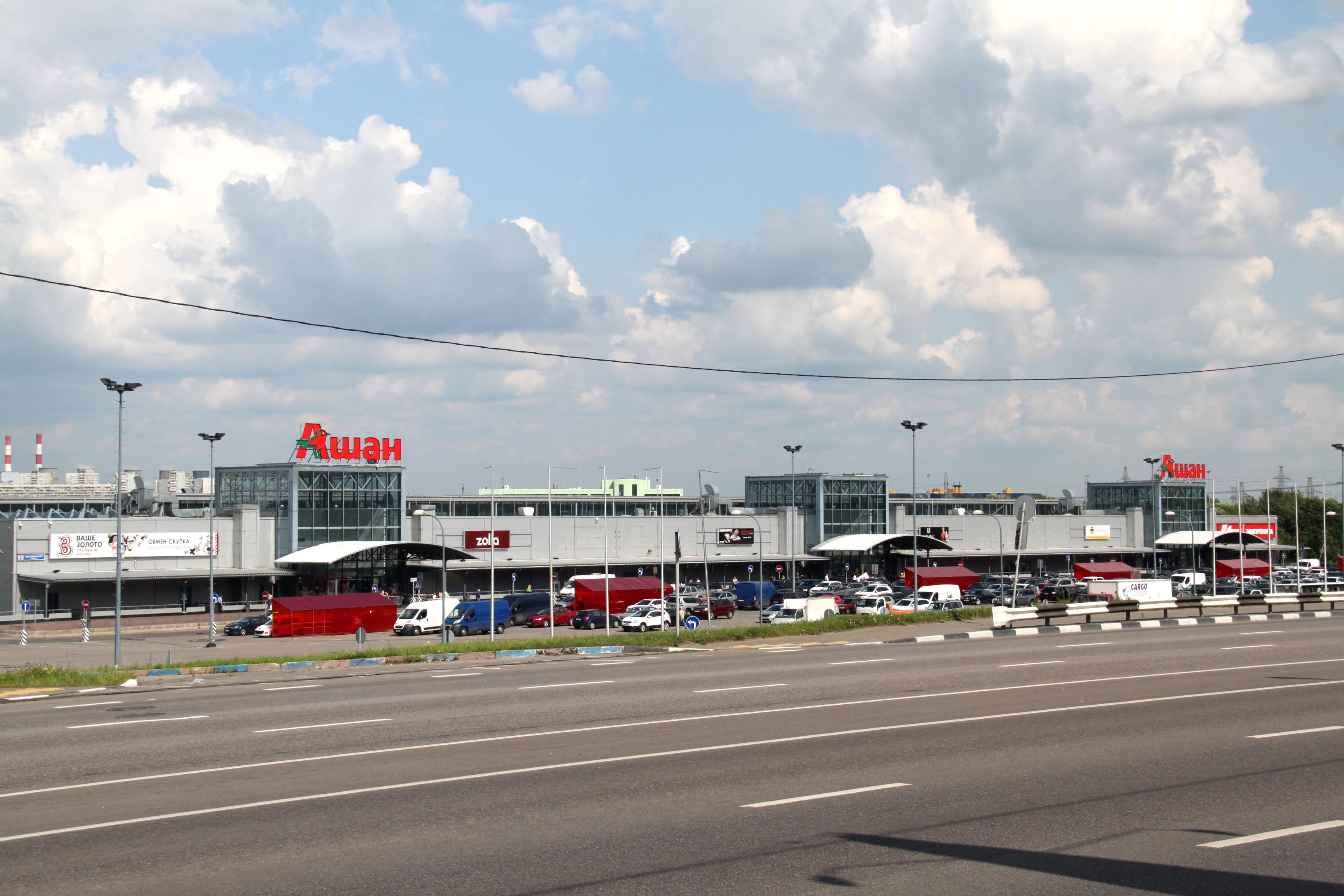 Ашан в районе Братеево города Москвы